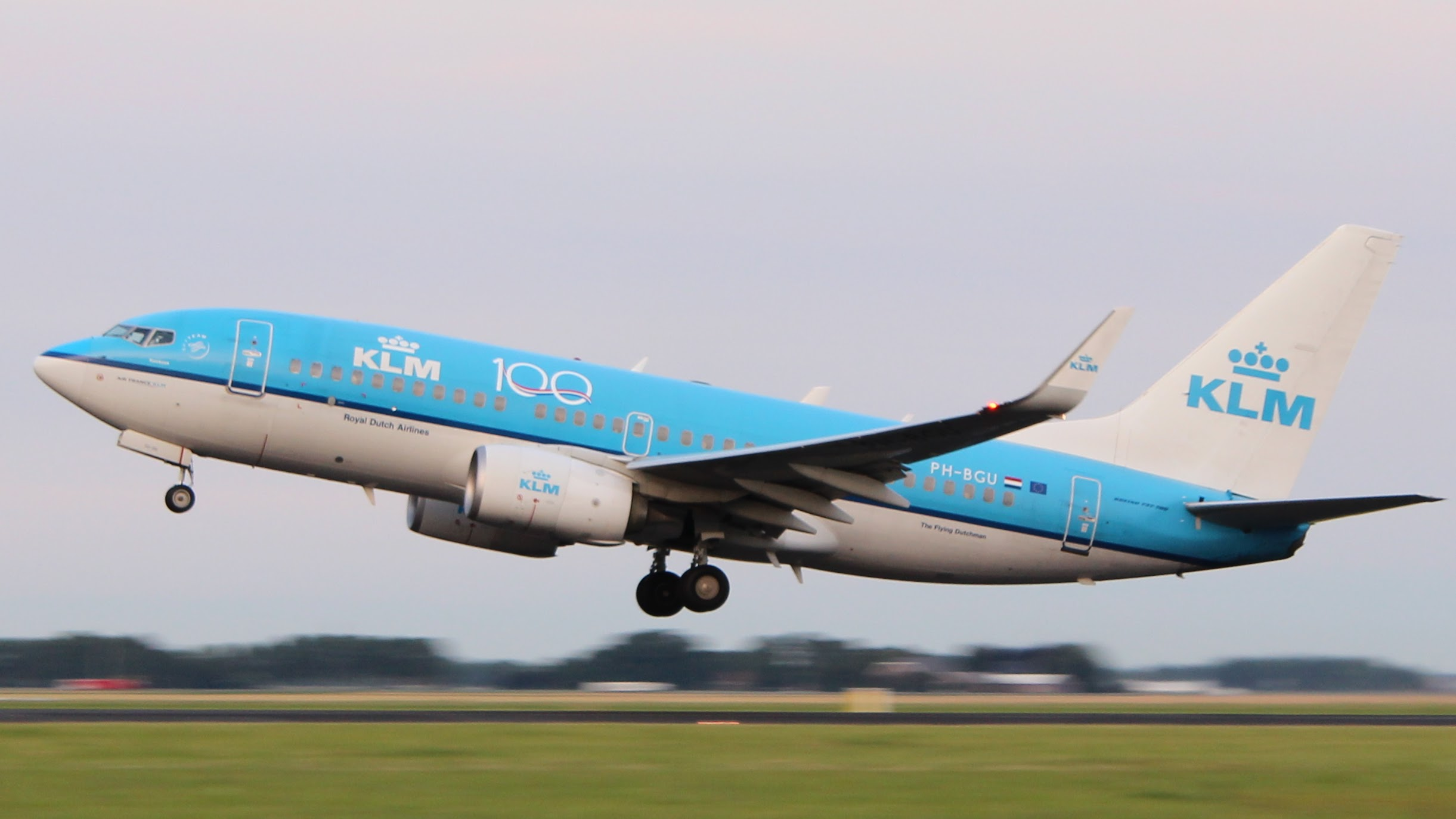 PH-BGU